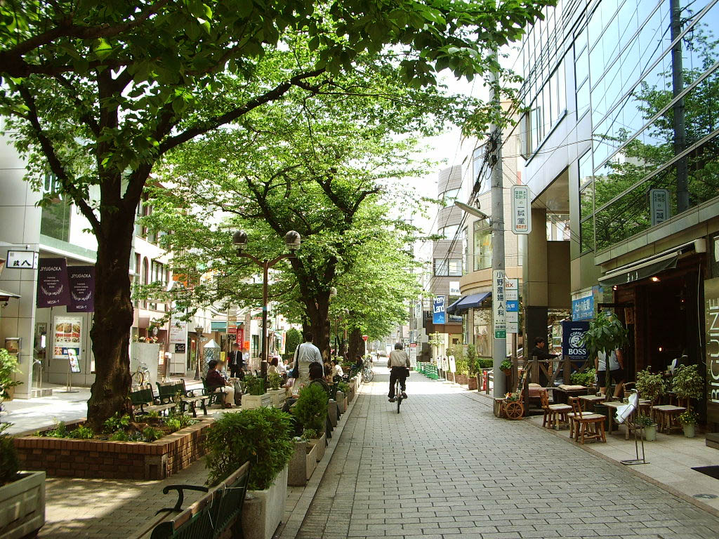 マリクレール通り